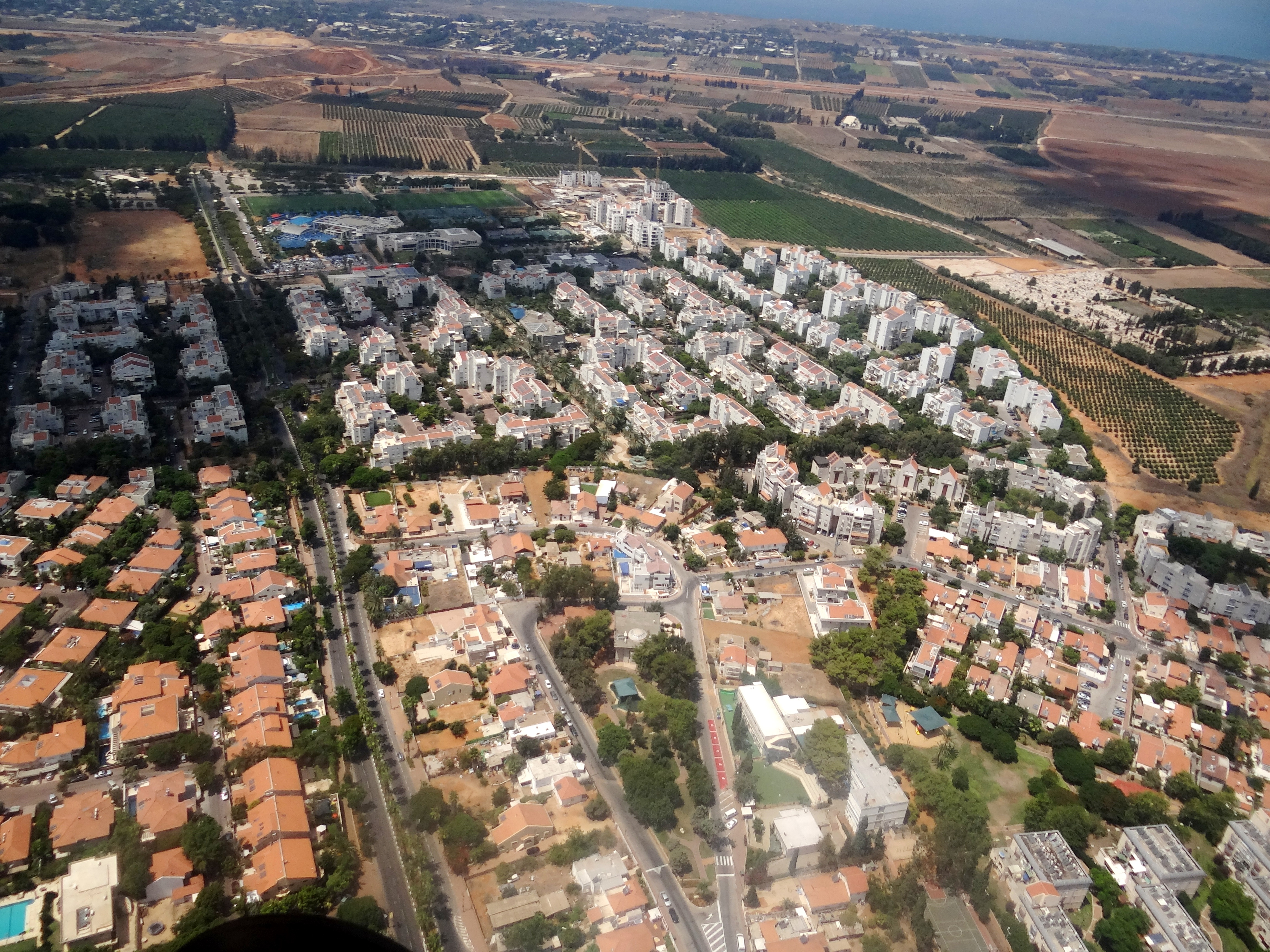 תצלום אוויר של רעננה השכונות המערביות